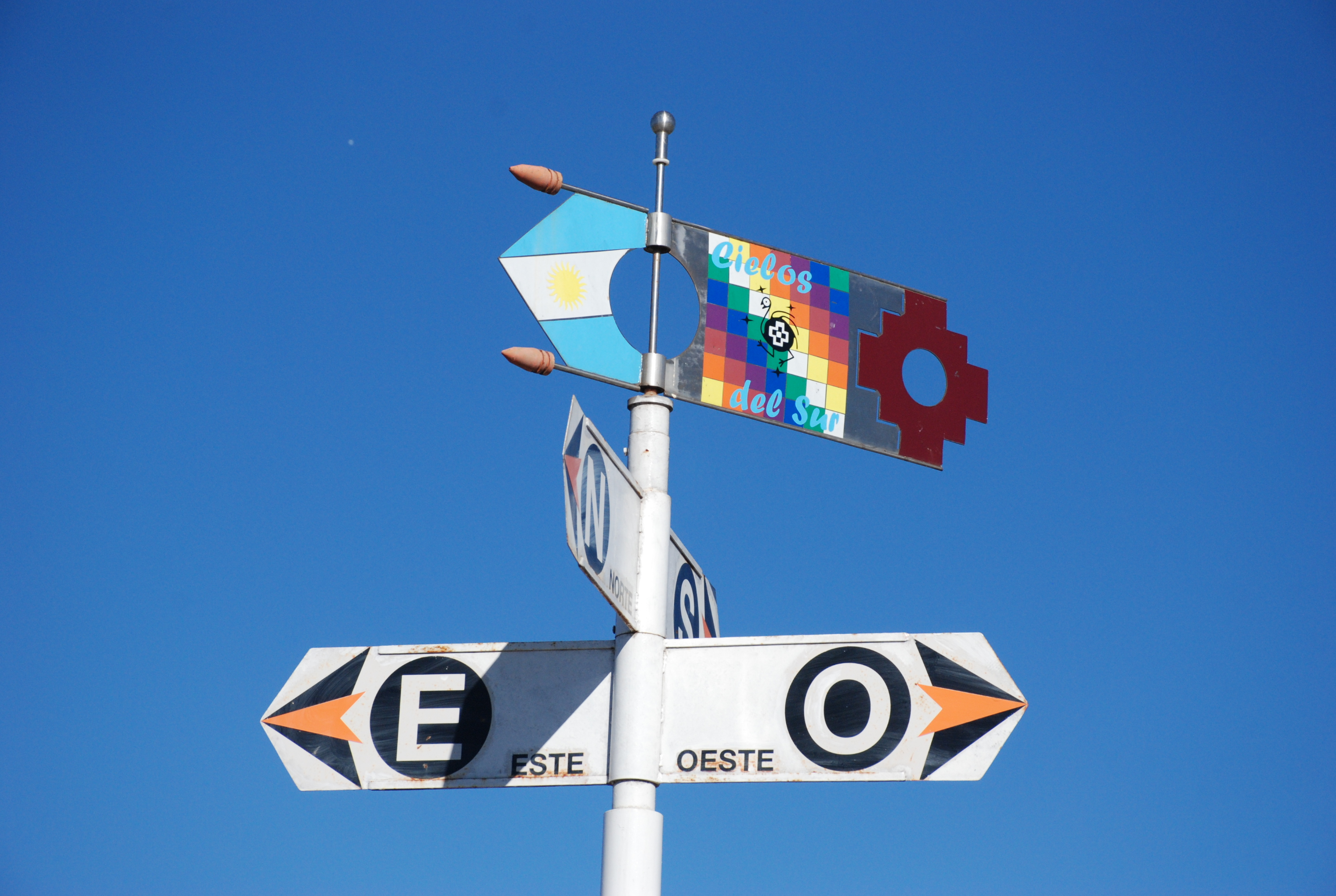 Observatorio de los recorridos del Sol del Parque Cielos del Sur, Chivilcoy, provincia de Buenos Aires.